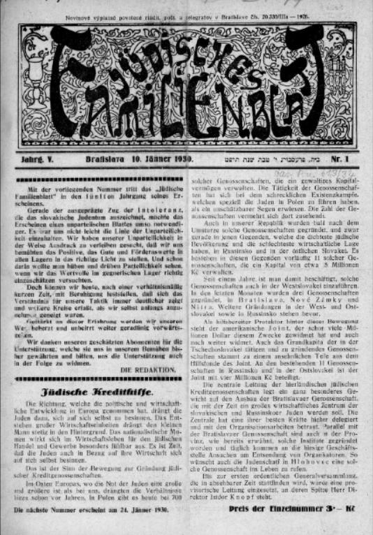 Titulný list týždenníka Jüdisches Familienblatt z r. 1926.